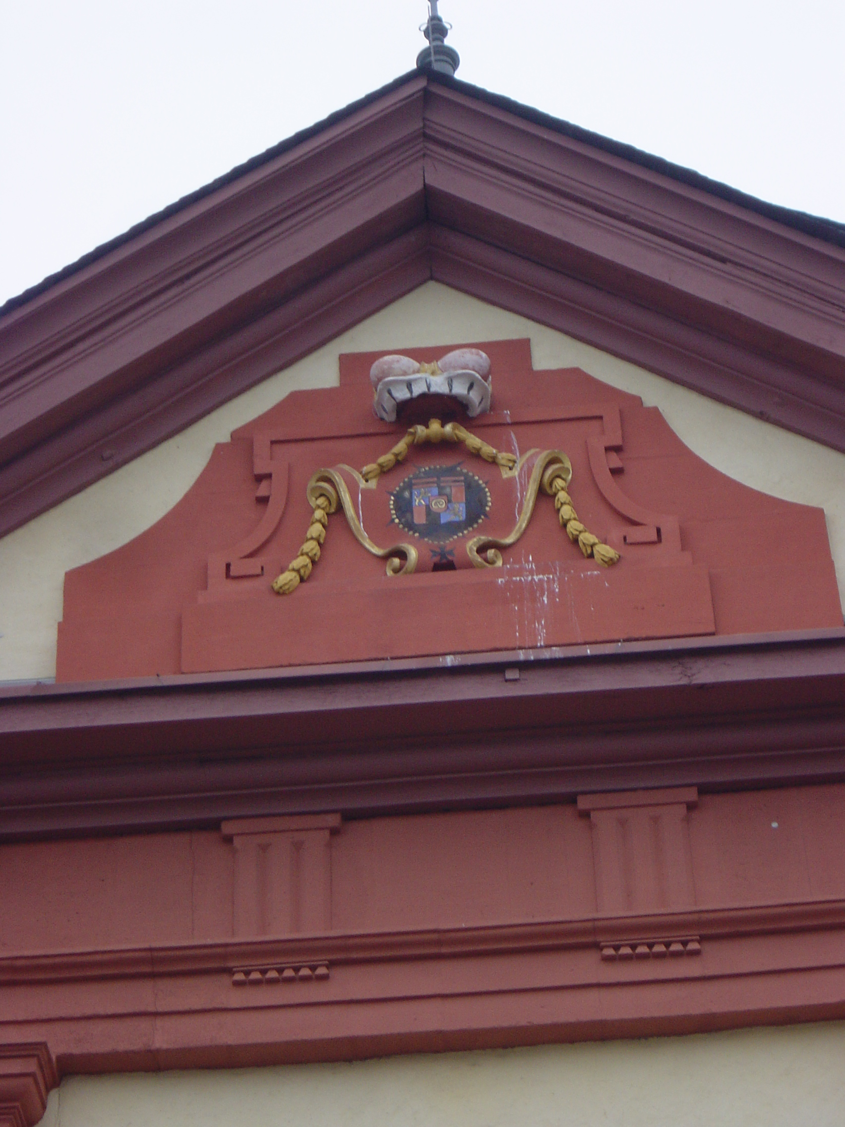 Wappen der kurzen Fürstenepoche des Fürsten Karl August von Bretzenheim (1768-1823) an der Frontseite der Bretzenheimer Kirche MARIA HILF. Schon die Rangkrone deutet mit einem Kurhut und einem Hermelinschwänzchen die Herkunft des Fürsten an. Unter dem eigentlichen Wappen wurde auch noch ein Abbildung des Malteserkreuz Ordens angebracht. Schon als Knabe war Karl August auf Bestreben seines Vater Kurfürst Carl Theodor von Bayern (1724-1799) zum Großprior des Malteser Ordens, bzw. des Georgsorden ernannt worden mit entsprechender regelmäßiger üppiger Apanage. Die Kirche wurde zwischen 1789 bis 1791 nach Plänen des Koblenzer Bauingenieurs Faxlunger als Simultankirche errichtet. Dies war notwendig, da damals die Kurpfalz evangelisch, die regierenden Herrscher aber katholisch waren. Faxlunger, in Mannheim tätig, hatte bereits 1774 das sog. Schloss in Bretzenheim für Karl August geumbaut. Fürst Karl August von Bretzenheim war 1788, kurz vor Baubeginn, bereits mit seinem Vater Kurfürst Carl Theodor von Mannheim nach München verzogen. 1789 wurde Karl August von Bretzenheim von Kaiser Joseph II. gegen Zahlung von 300.000 fl zum Reichsfürsten mit eigener Herrschaft ernannt. Ein Jahr nach Fertigstellung der Kirche war die Fürstenepoche bereits zu Ende, da 1792 die Französische Revolutionsarmee unter General Custine auch in Bretzenheim auftauchte.